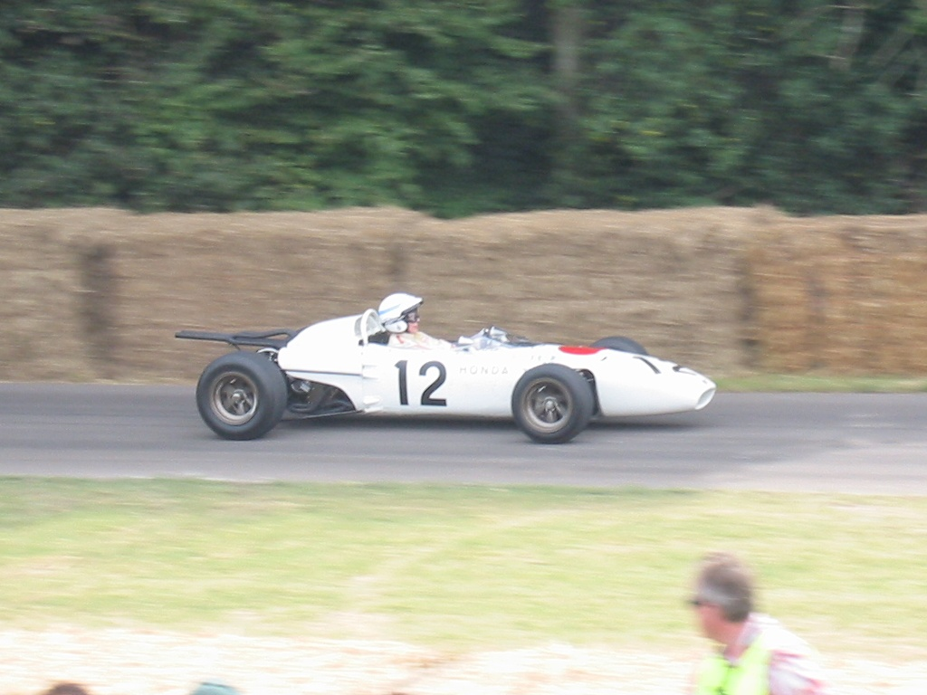 1.5 litre transverse V12 producing 230bhp